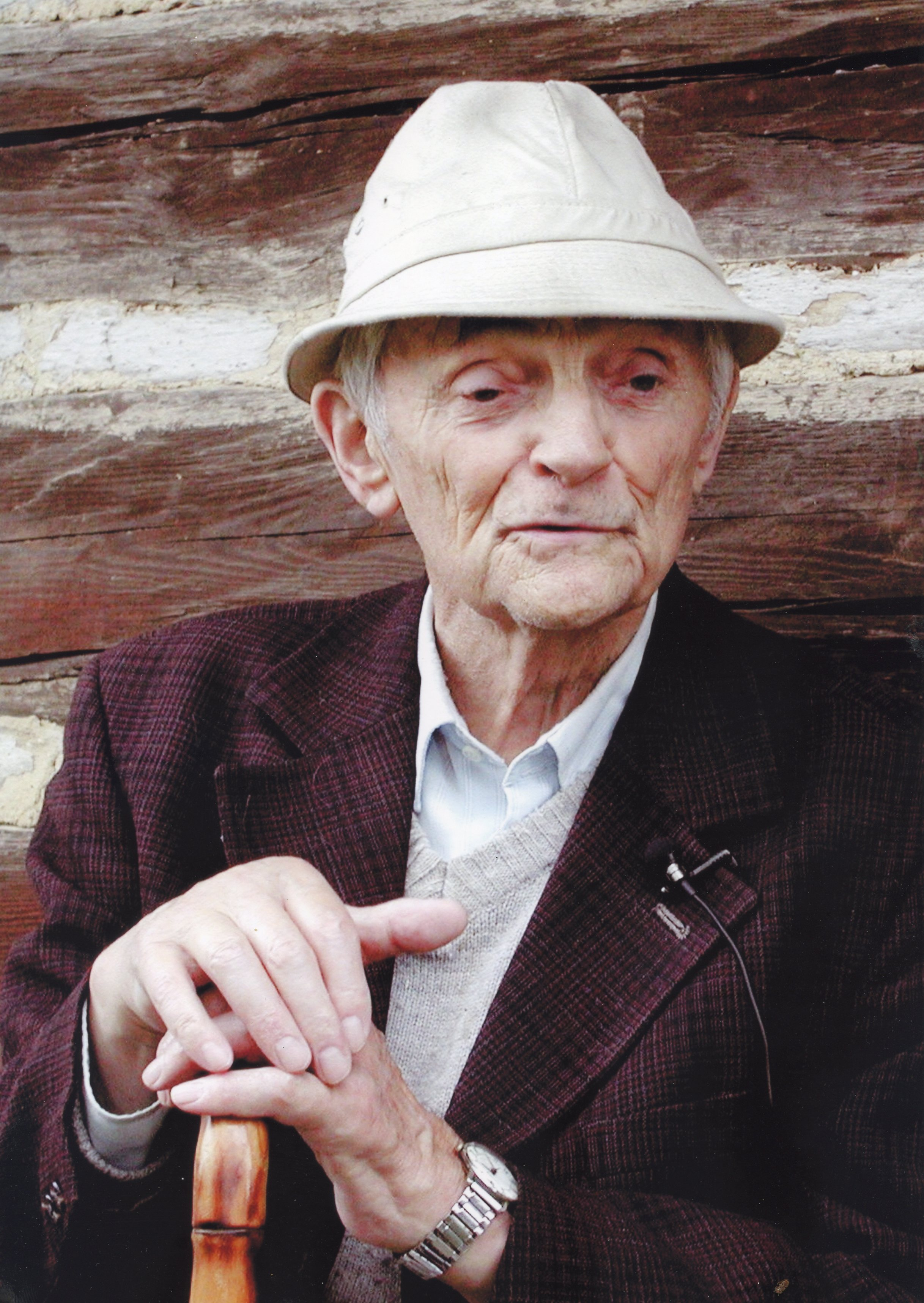 Karel Samšiňák při natáčení filmu Šolcova přervaná písni... Foto dr. Ivan Kafka